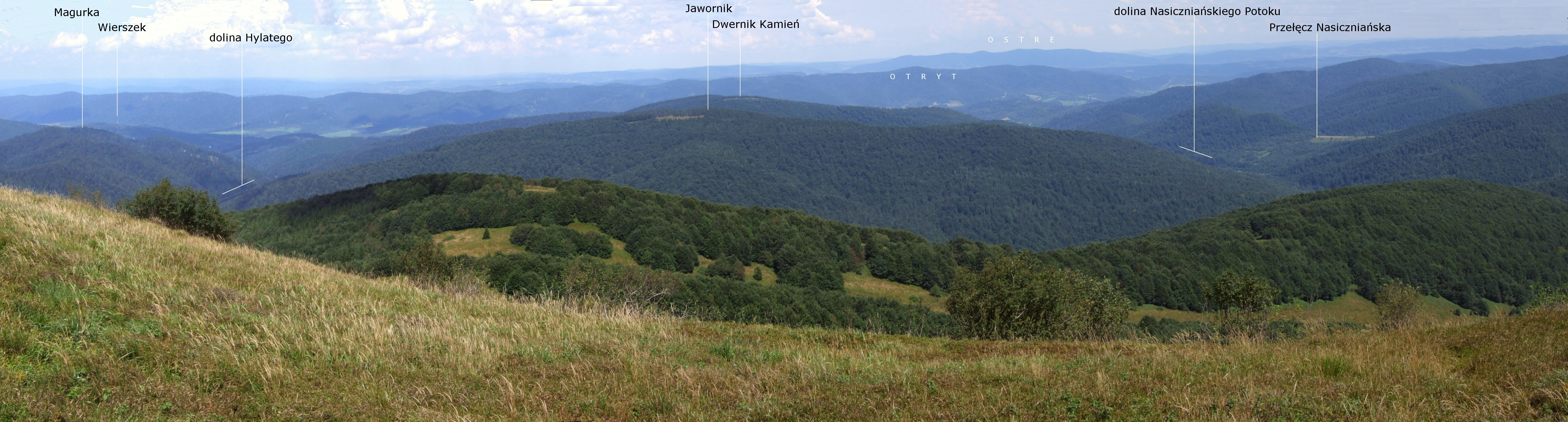 Panorama w północnym kierunku z Połoniny Wetlińskiej